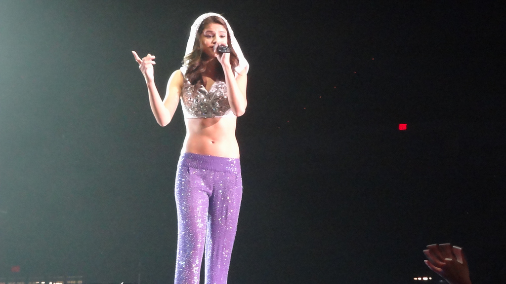 Selena Gomez durante el We Own the Night Tour (2011)